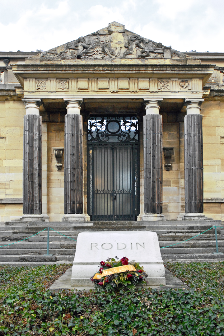 La tombe d'Auguste Rodin (1840-1917) et de son épouse Rose Beuret est placée devant la façade récupérée du château d'Issy incendié en 1871 et reconstruite à Meudon, Villa des Brillants, 19 avenue Auguste Rodin, où se trouvait l'atelier du sculpteur..